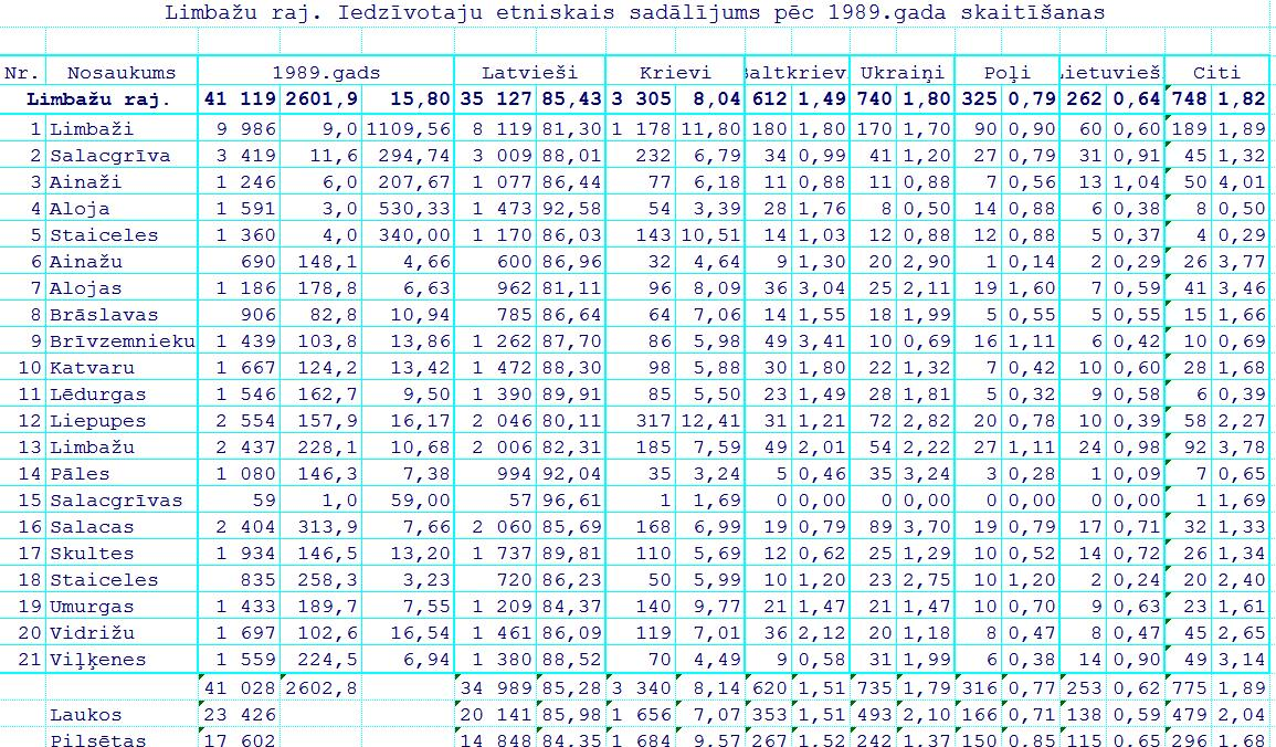 Этнический состав населения Латвии по переписи 1989 года